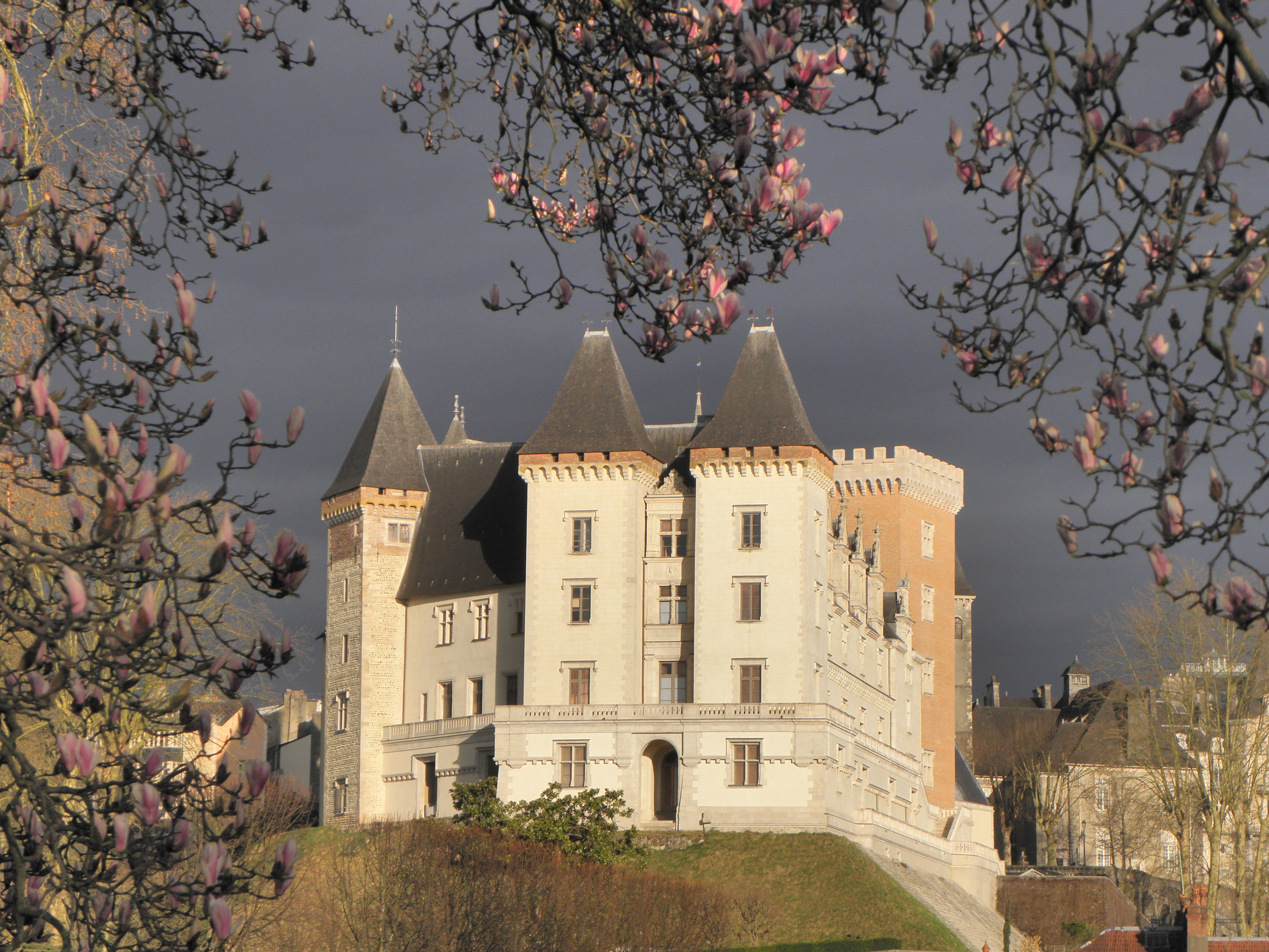 Château de Pau (ClasséClassé) .